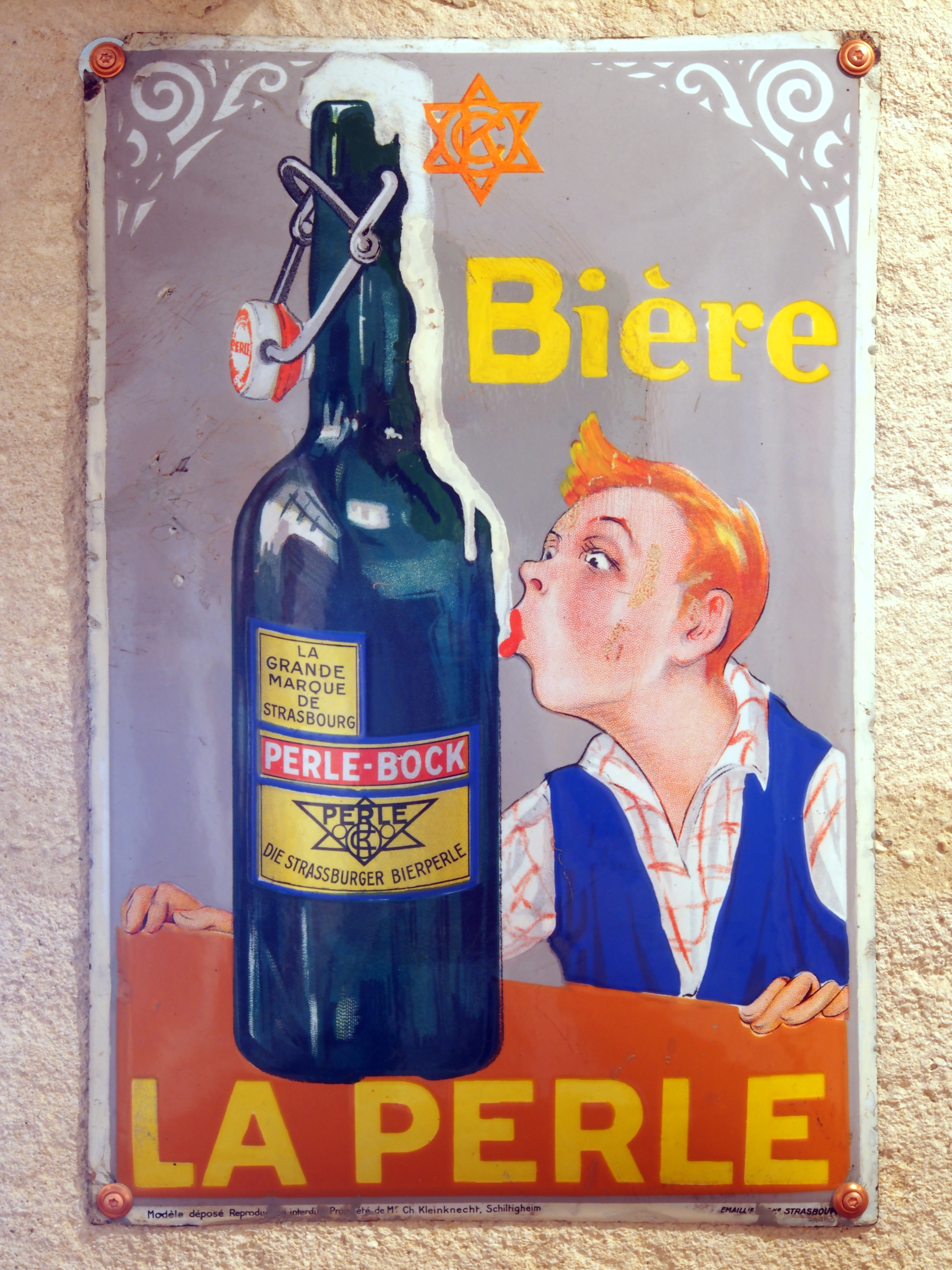 Bière La Perle , enamel advertising sign at the Musée Européen de la Bière.